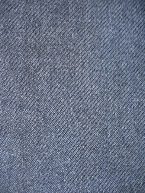 Gabardine aus PES/Wolle